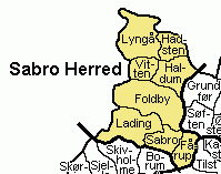 Århus Amt, Denmark